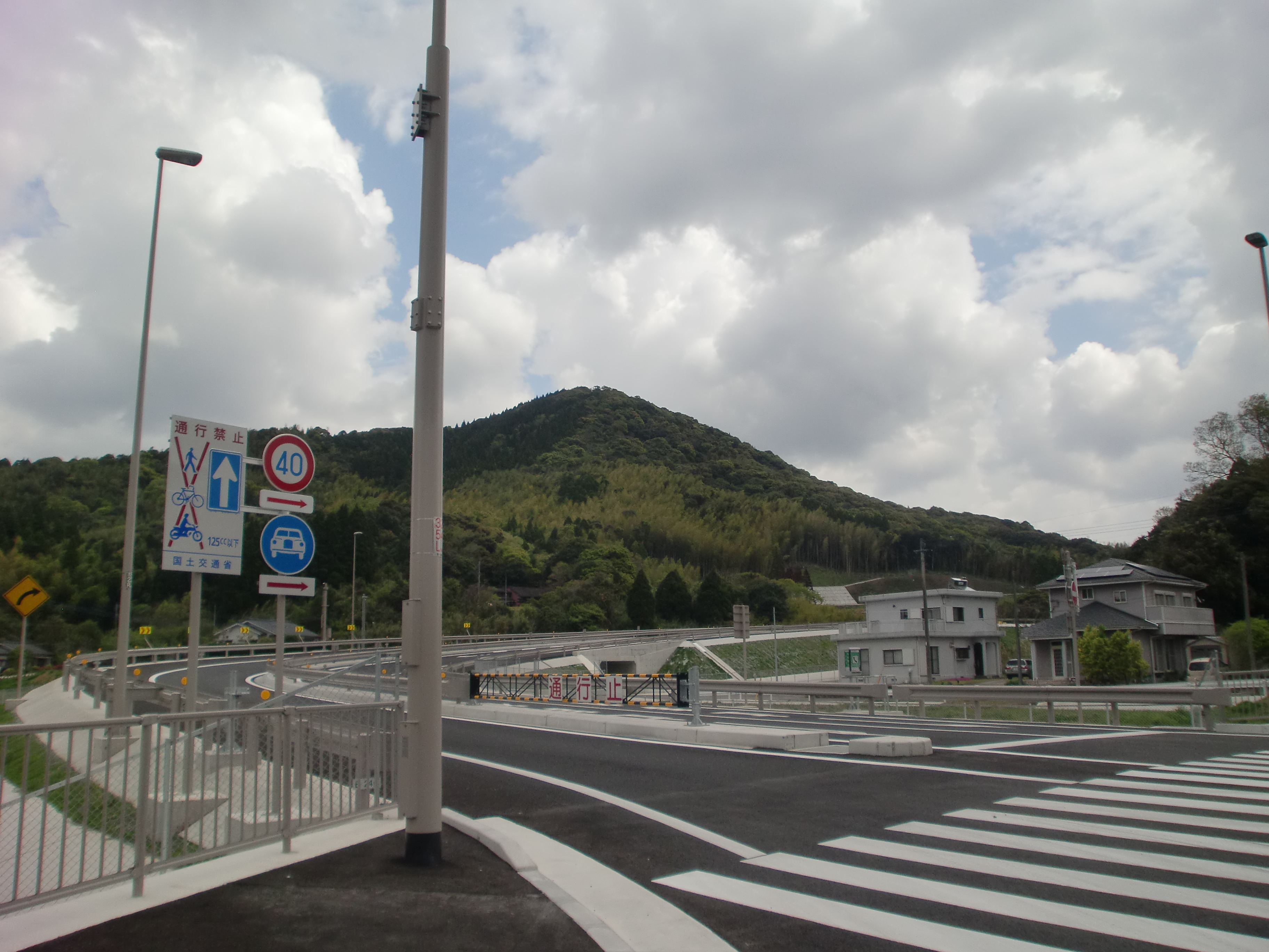 薩摩川内水引インターチェンジの出入り口。2013年時点では鹿児島方面のみが開通している。